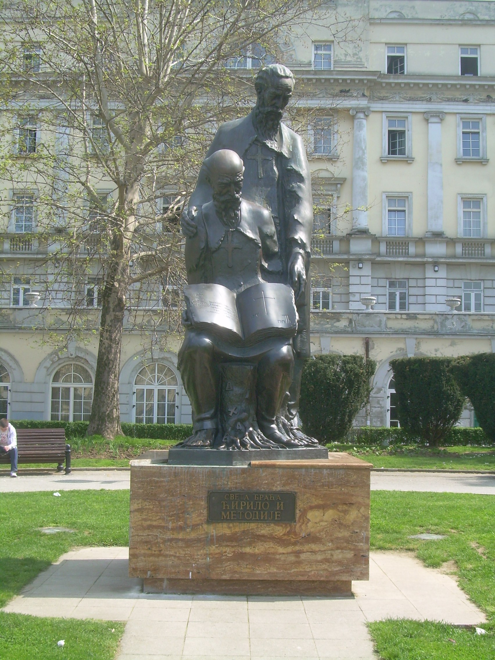 Споменик Ћирилу и Методију у Београду. Парк испред студентског дома Краљ Александар, улица Краља Александра.